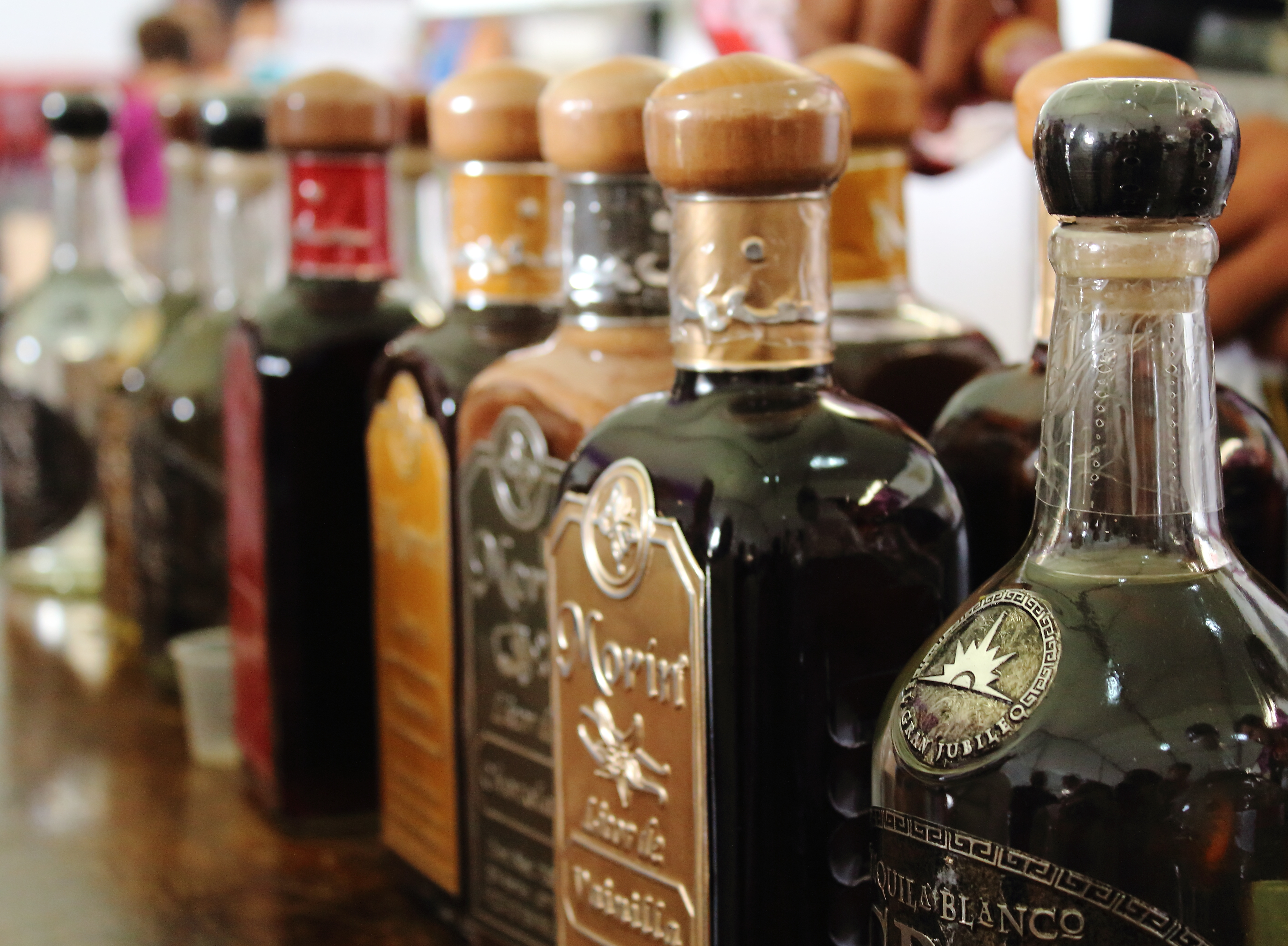 Tequilas de diversos sabores hechos en Jalisco, México.